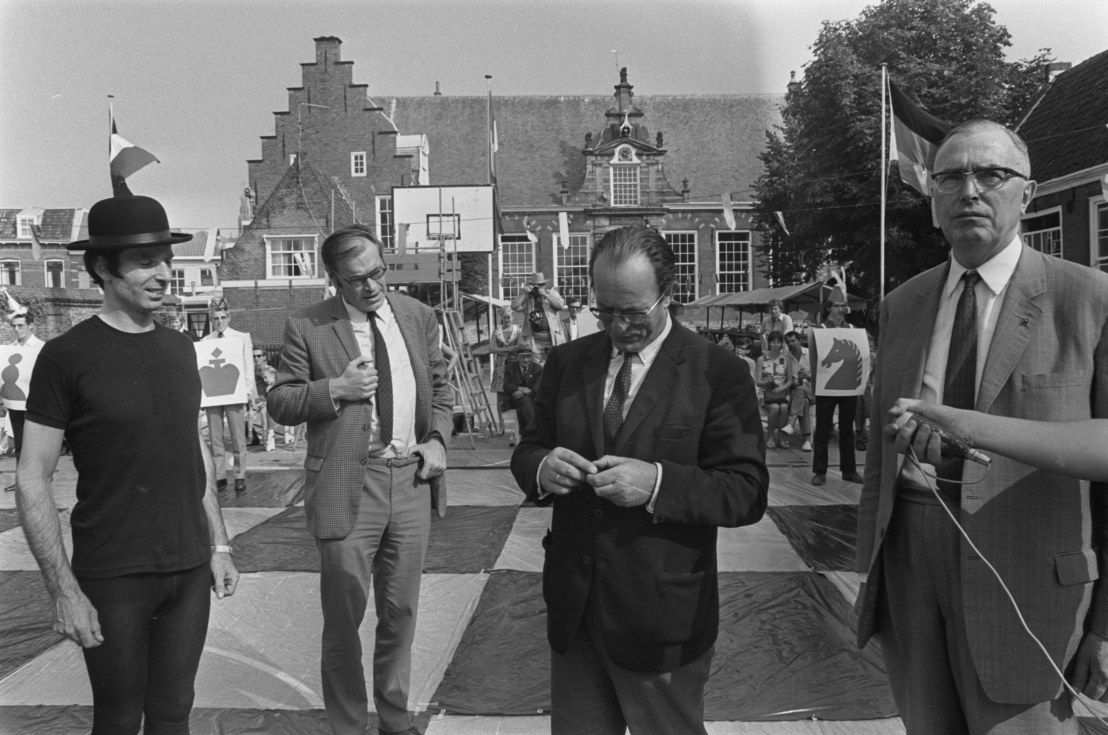 Collectie / Archief : Fotocollectie Anefo Reportage / Serie : [ onbekend ] Beschrijving : Godfried Bomans en dr. Max Euwe spelen schaakspel met levende stukken, Haarlem Datum : 29 augustus 1970 Locatie : Haarlem Trefwoorden : schaken Persoonsnaam : Bomans, Godfried, Dr. Max Euwe Fotograaf : Mieremet, Rob / Anefo Auteursrechthebbende : Nationaal Archief Materiaalsoort : Negatief (zwart/wit) Nummer archiefinventaris : bekijk toegang 2.24.01.05 Bestanddeelnummer : 923-7913